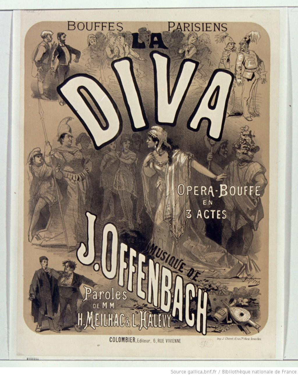 Affiche de Jules Chéret pour la création de La Diva de Jacques Offenbach au Bouffes-Parisiens